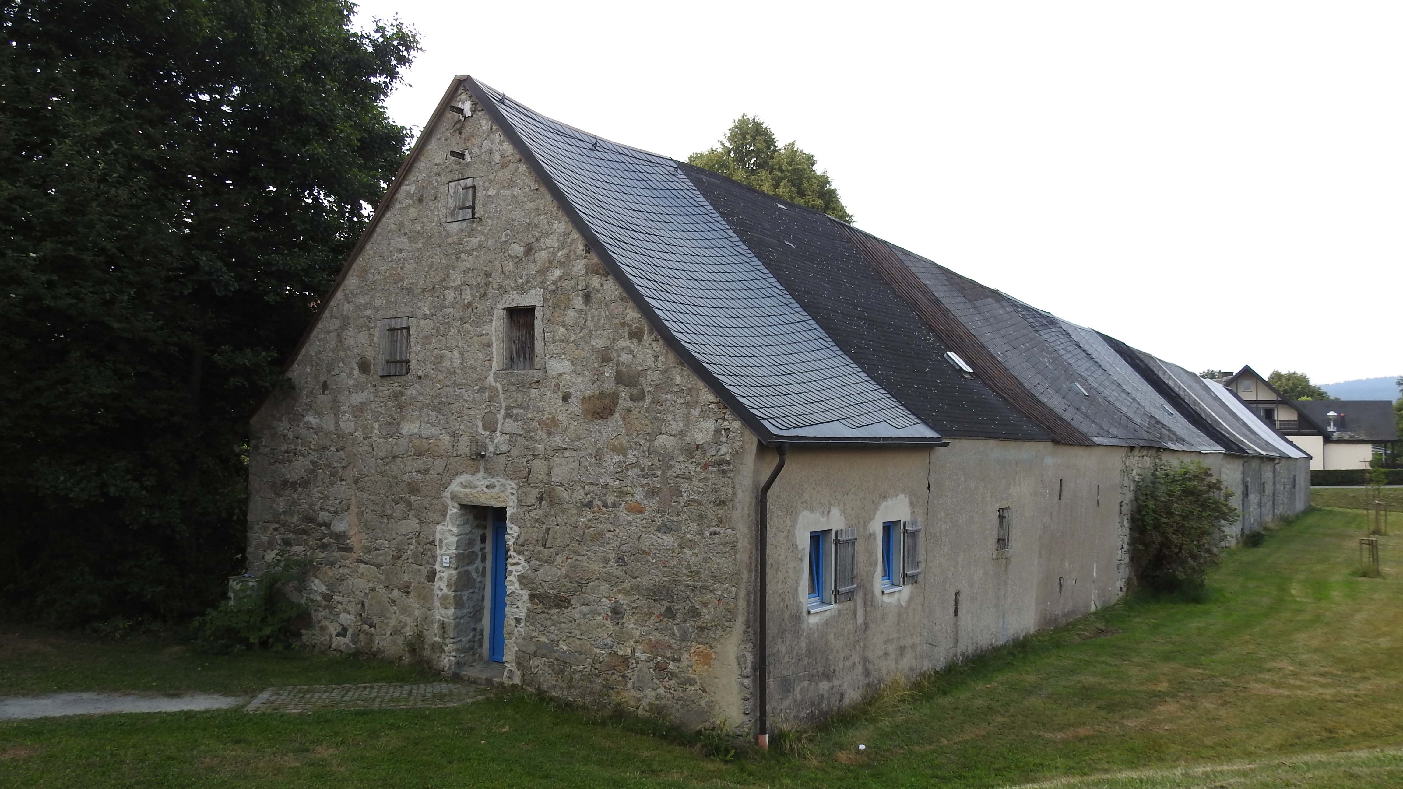 Stadelreihe am Mühlengraben in Weißenstadt